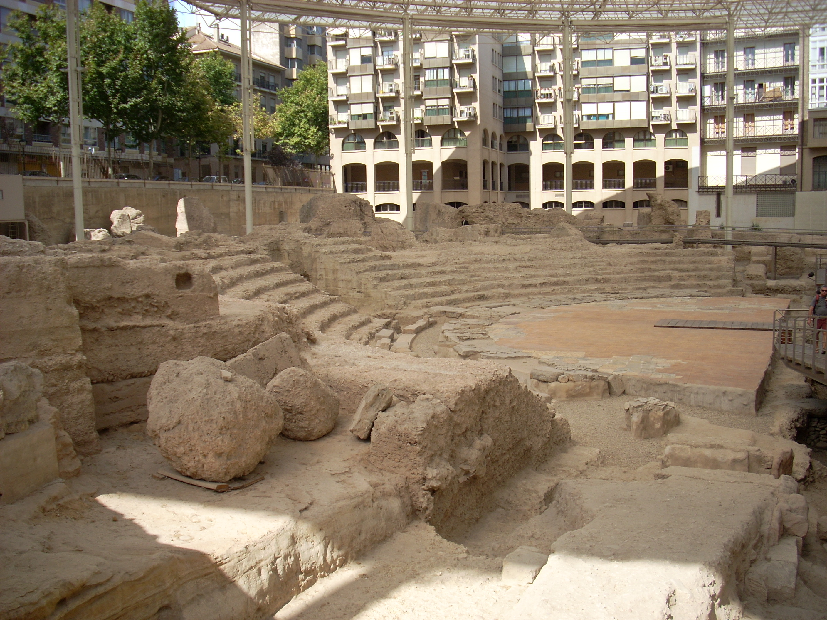 Teatro romano, Saragozza, Spagna